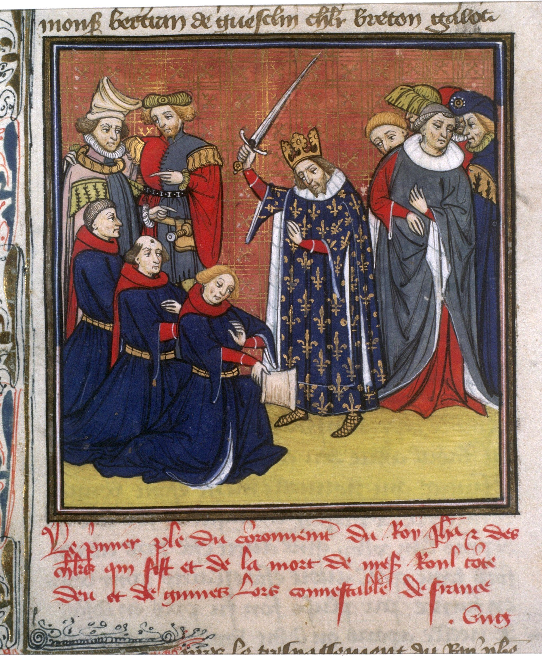 Jean II adoubant des chevaliers, Enluminure en Latin des XIVe / XVe siècle ; Cote : Français 73, folio 386. XIVe / XVe siècles.